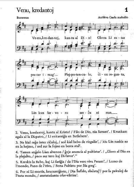 Himno en "Adoru kantante", montrante la manieron de prezento kaj la specon de la muzika partituro.